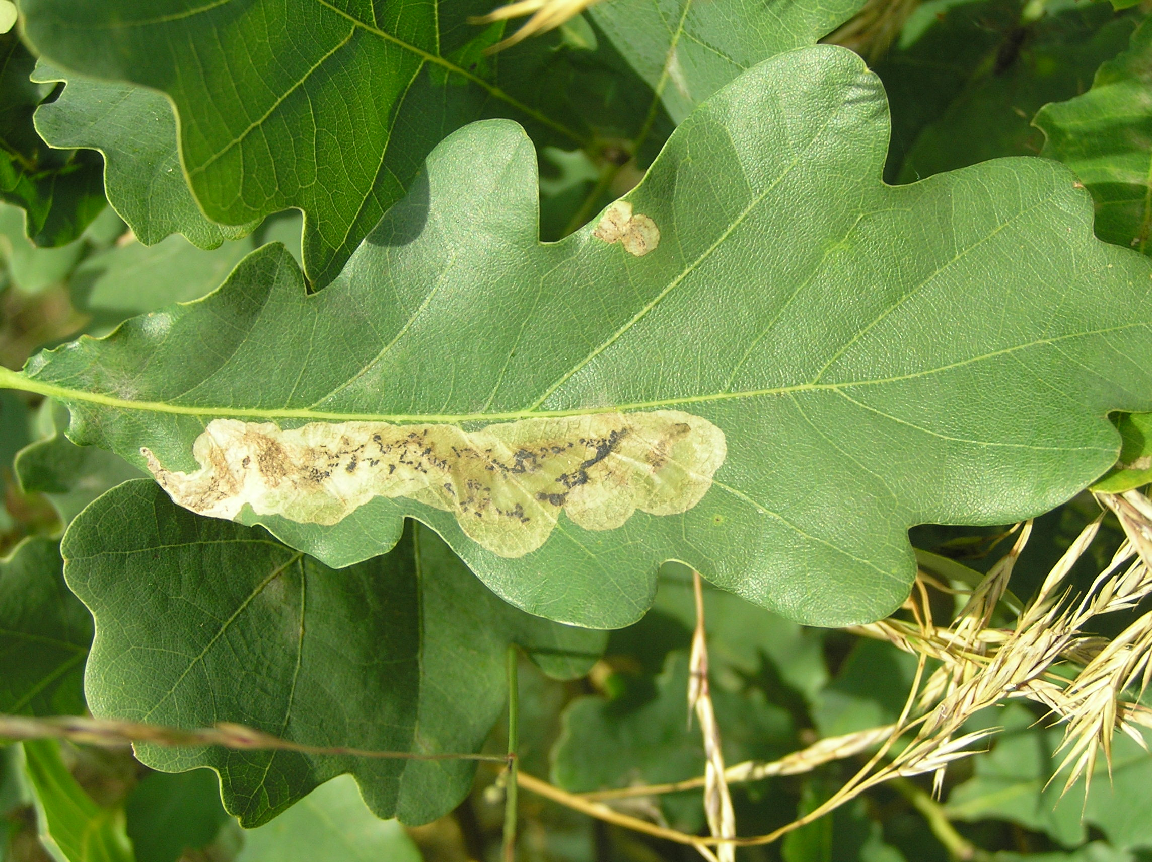 Tischeria complanella